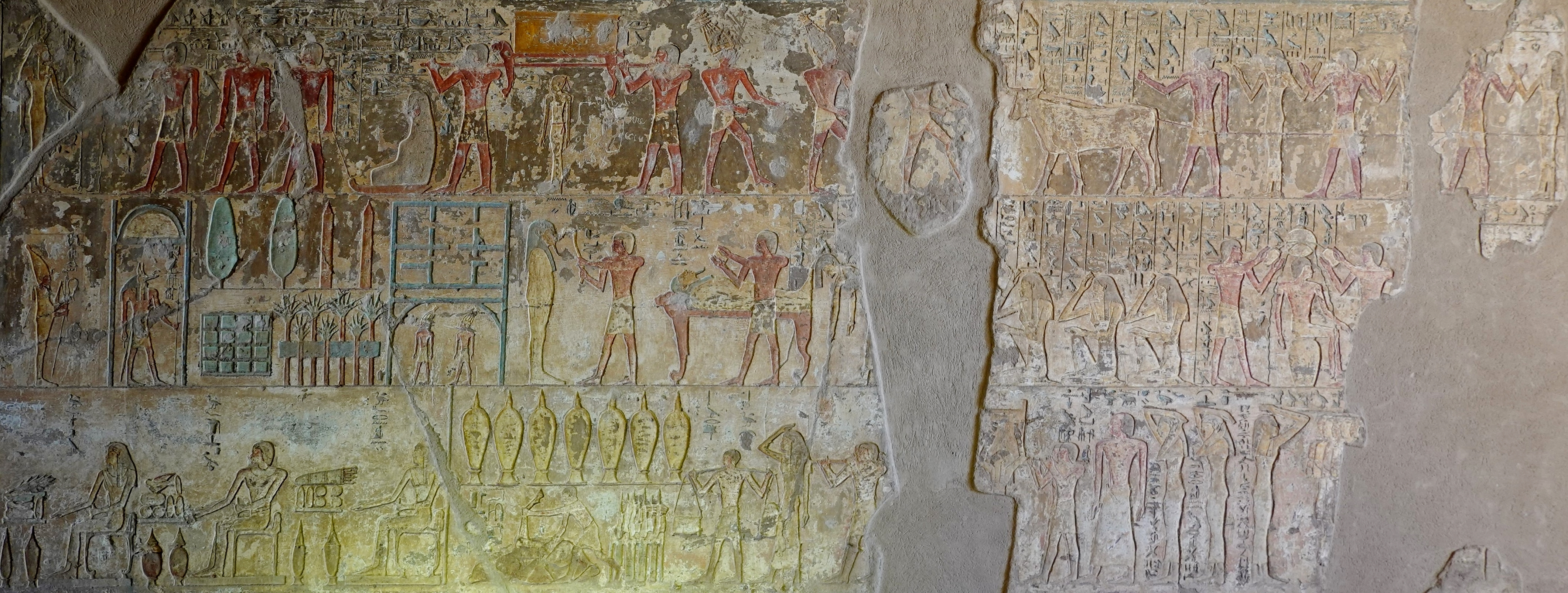 Detail des Reliefs der Ostwand im Felsengrab des Renni unter den Felsengräbern des altägyptischen Necheb bei el-Kab, Ägypten